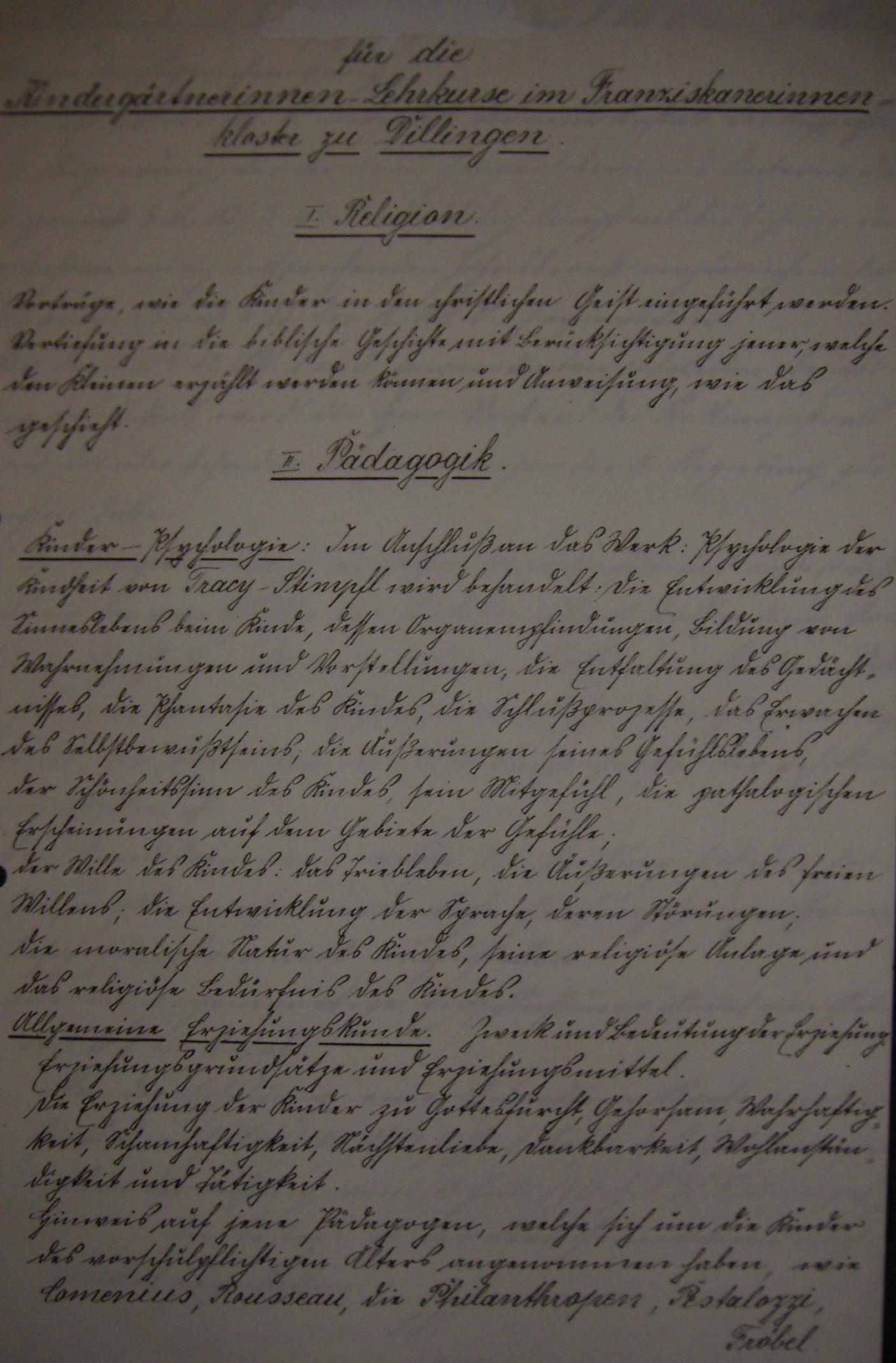 Lehrplan Fachakademie Dillingen